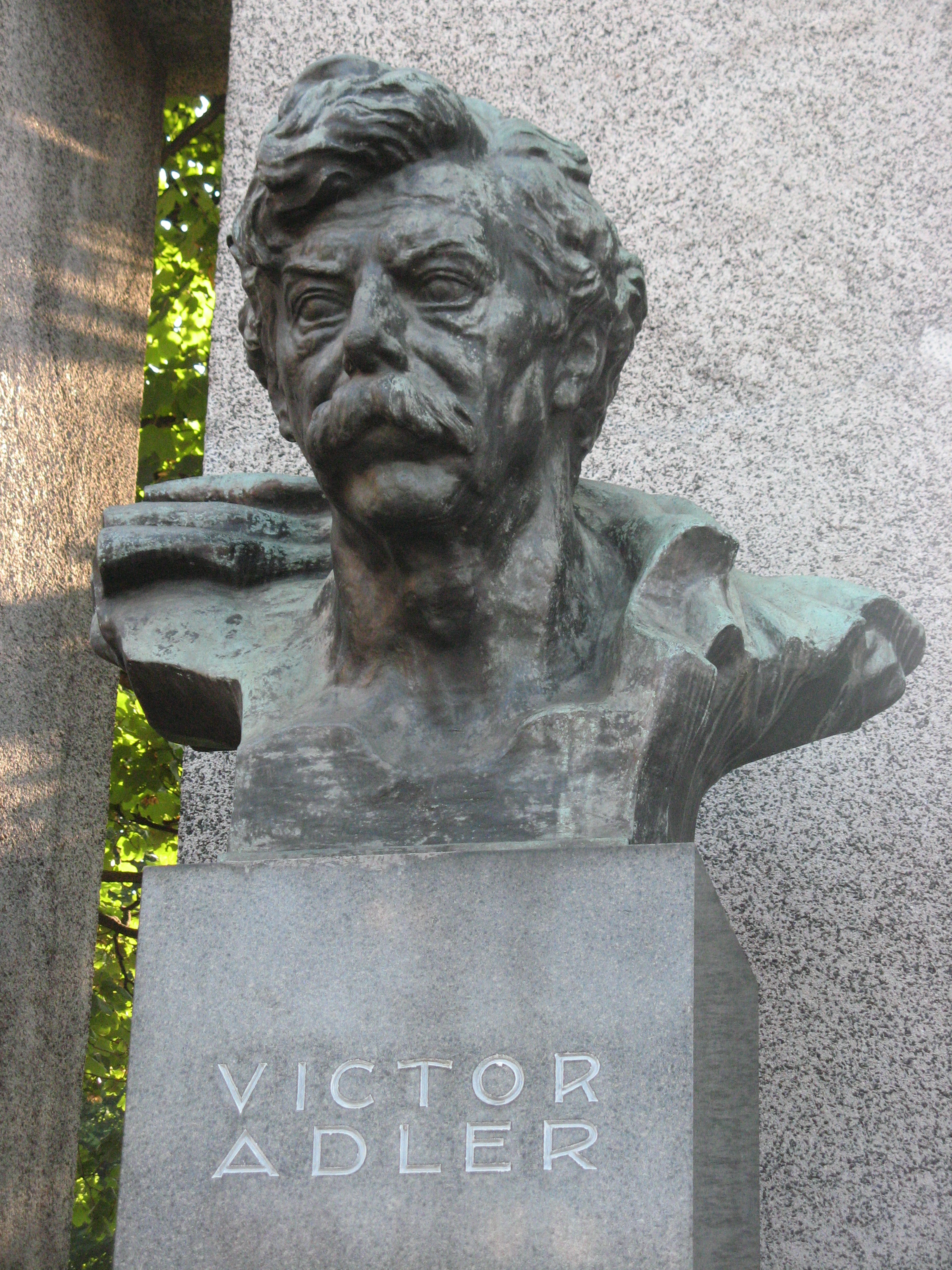 Büste Victor Adler (1928) von Anton Hanak, Republikdenkmal, Schmerlingplatz, Wien-Innere Stadt